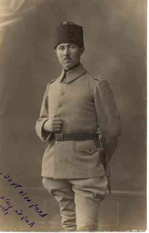 דוד הכהן במדים בצבא העותמאני David Hacohen in uniform קושטא 05 התקופה העות'מאנית 5